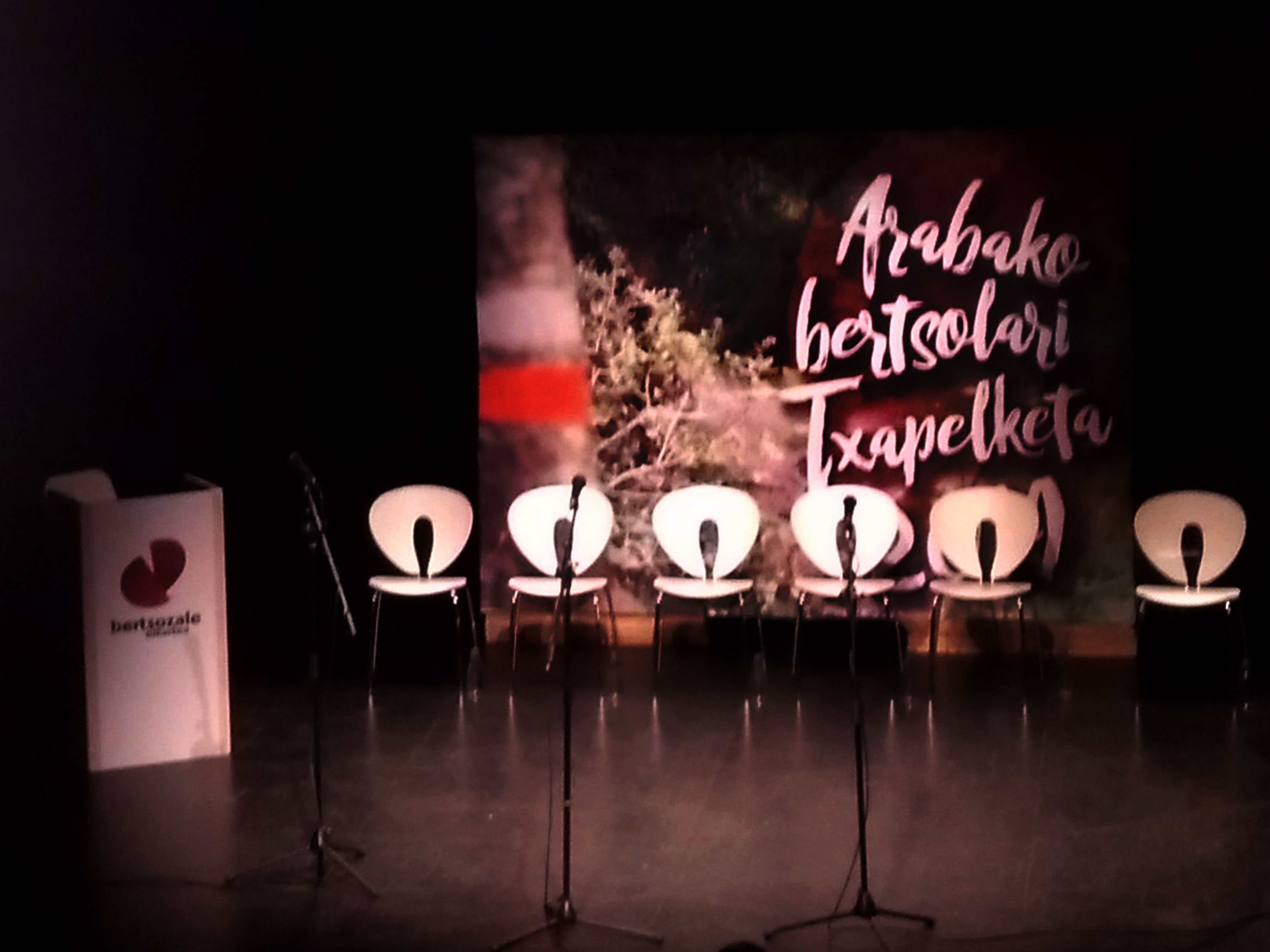 Arabako Bertsolari Txapelketa 2019